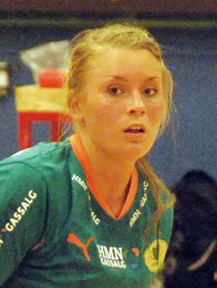 Håndboldspilleren Isabelle Gulldén fra Viborg HK Her i en kamp mod FC Midtjylland Håndbold i Viborg Stadionhal.